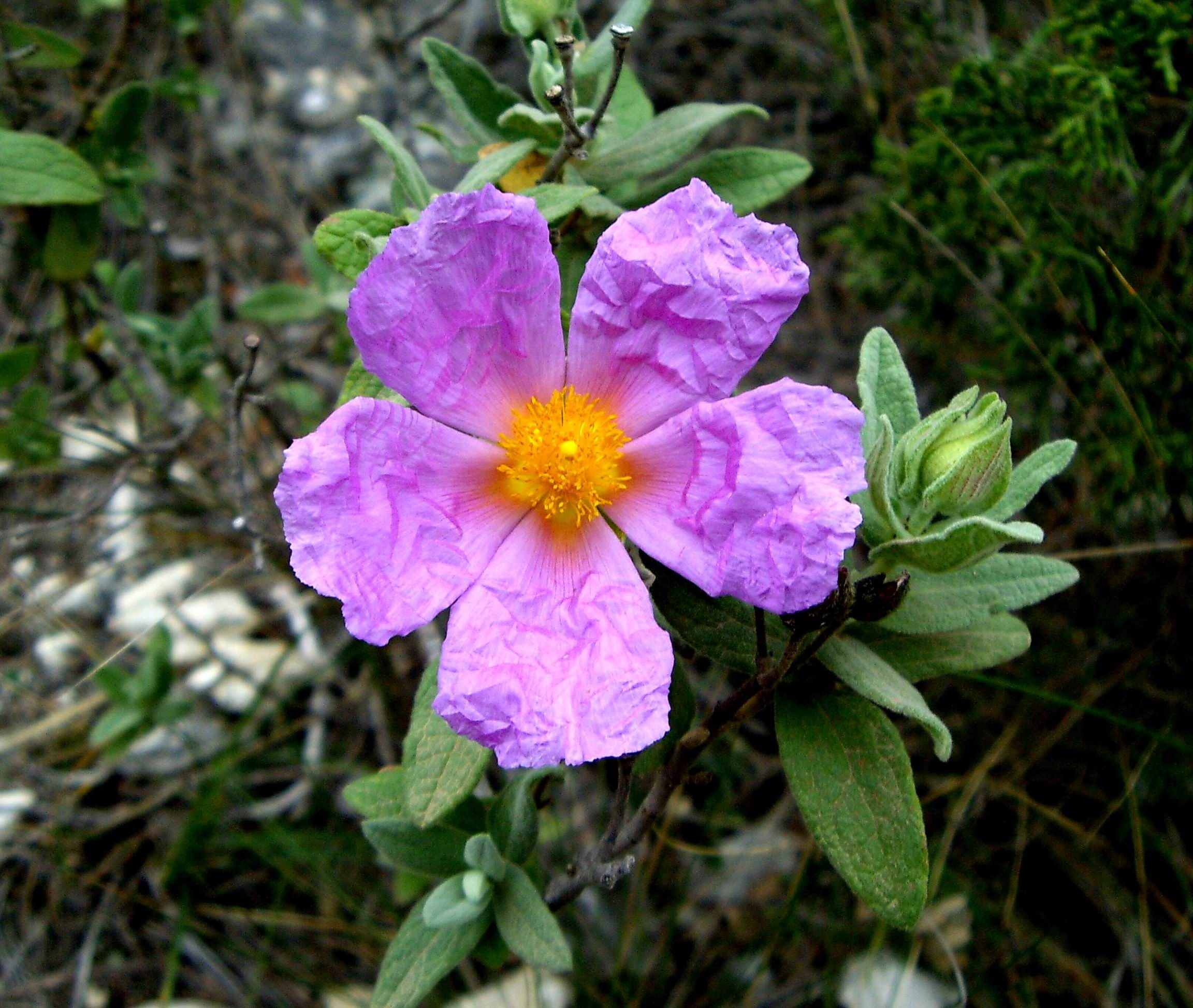 Flor de Cistus Albidus. Elda